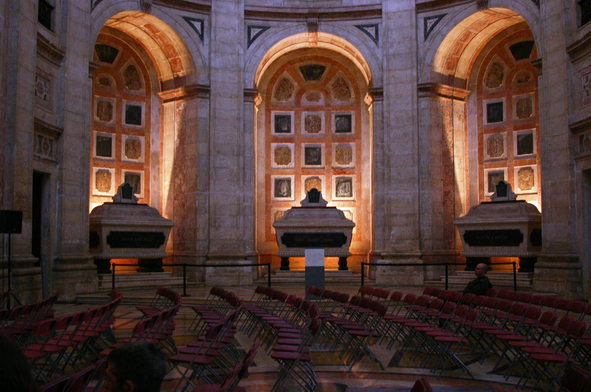 Interior de Santa Engrácia